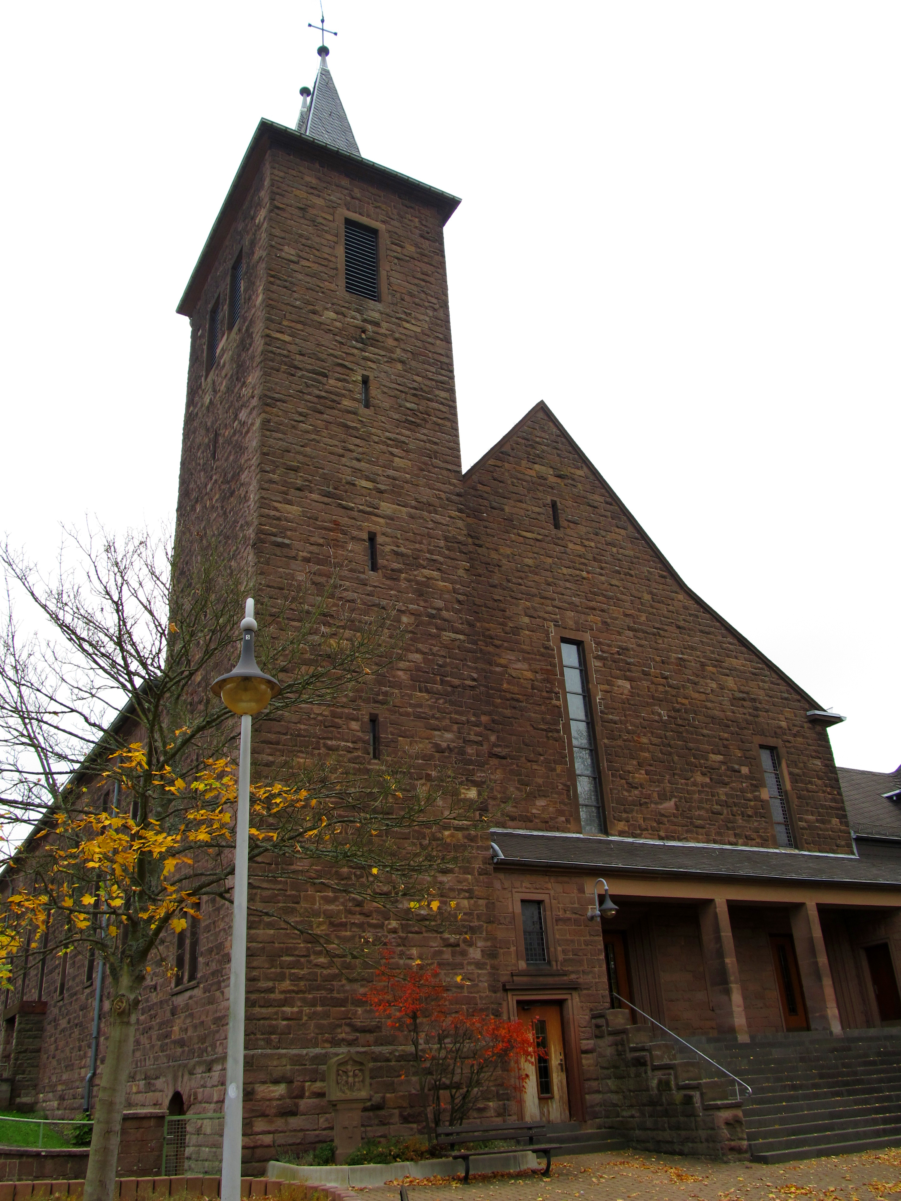 Die katholische Pfarrkirche Herz Jesu in Wustweiler, einem Ortsteil von Illingen, Landkreis Neunkirchen, Saarland